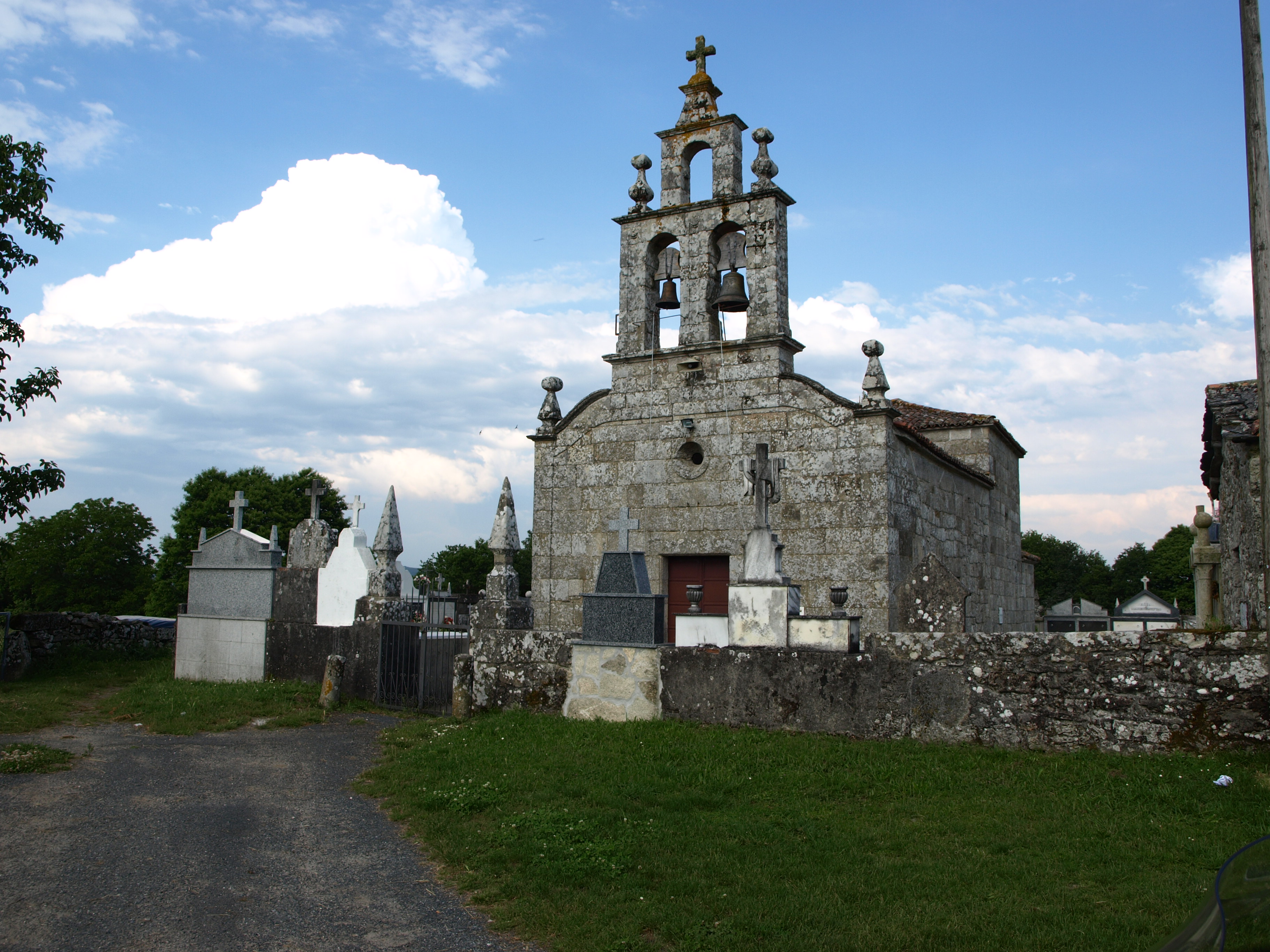 Igrexa parroquial de San Martiño de Vilapoupre (Antas de Ulla)